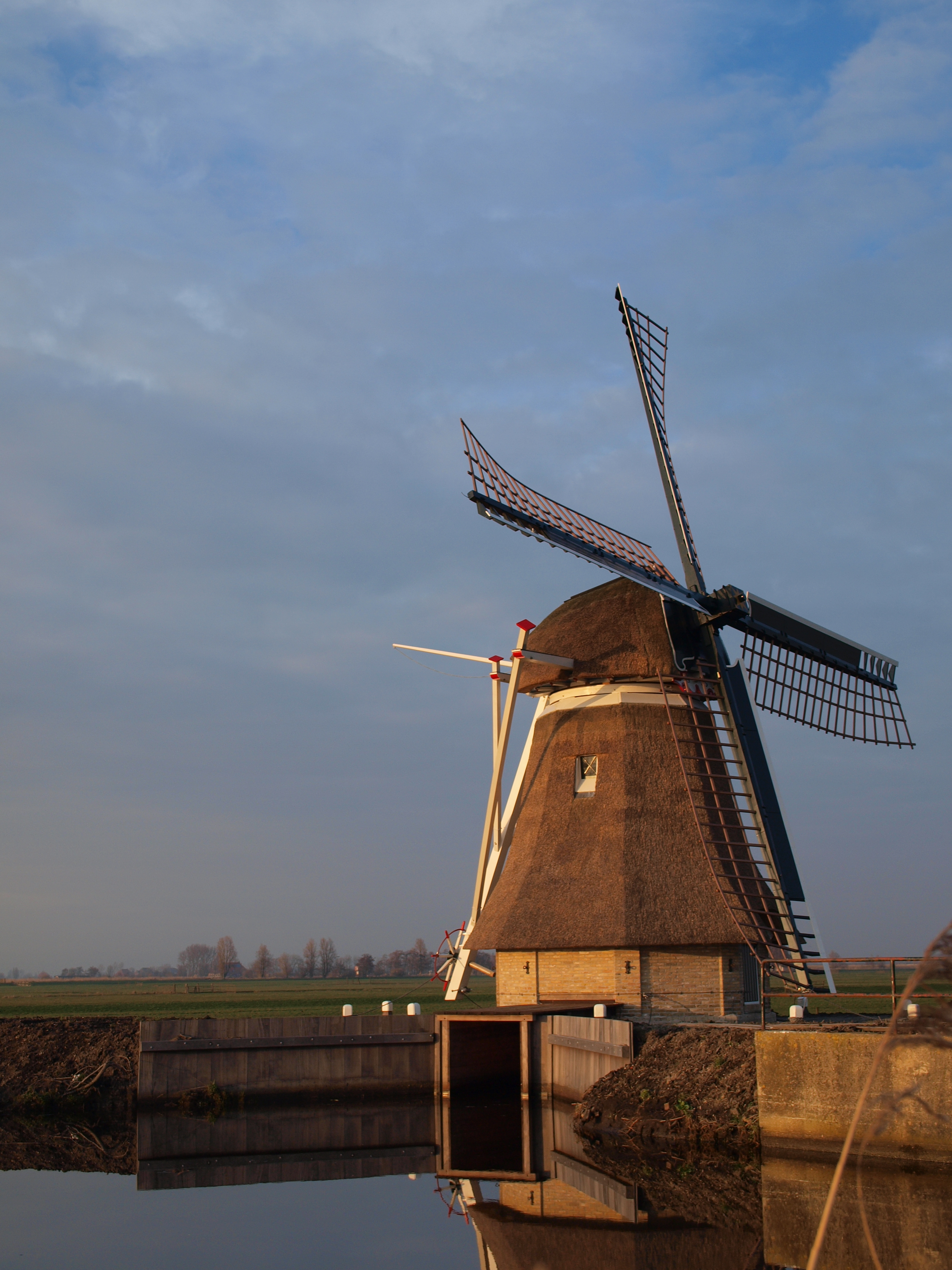 Windmolen De Borgmolen op het eiland De Bird bij Grou